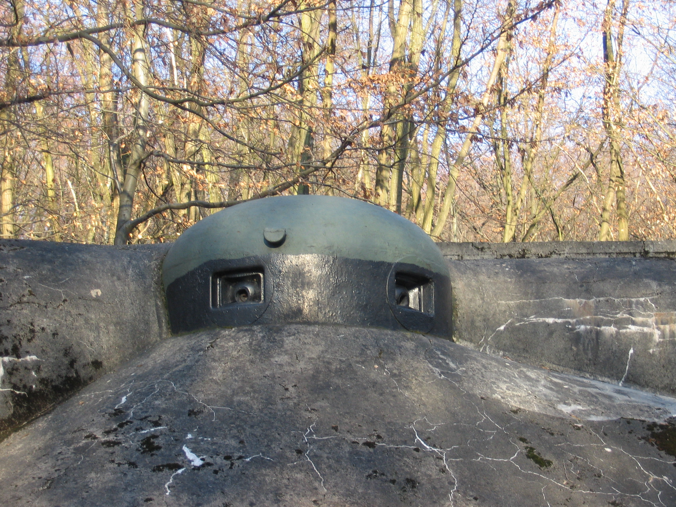 Fort de Schoenenbourg, élément de la ligne Maginot. Entrée des hommes (bloc 8). Detail tourelle. Photo prise par Denis Helfer sous licence GFDL.